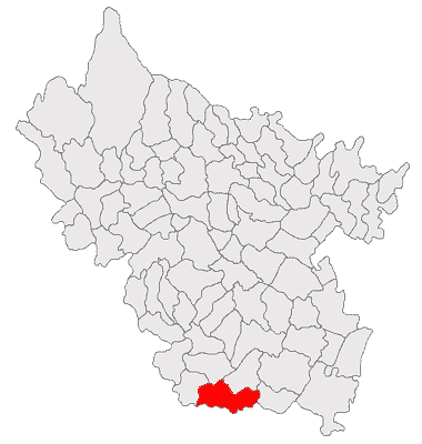 Categorie:Hărţi ale judeţului Buzău